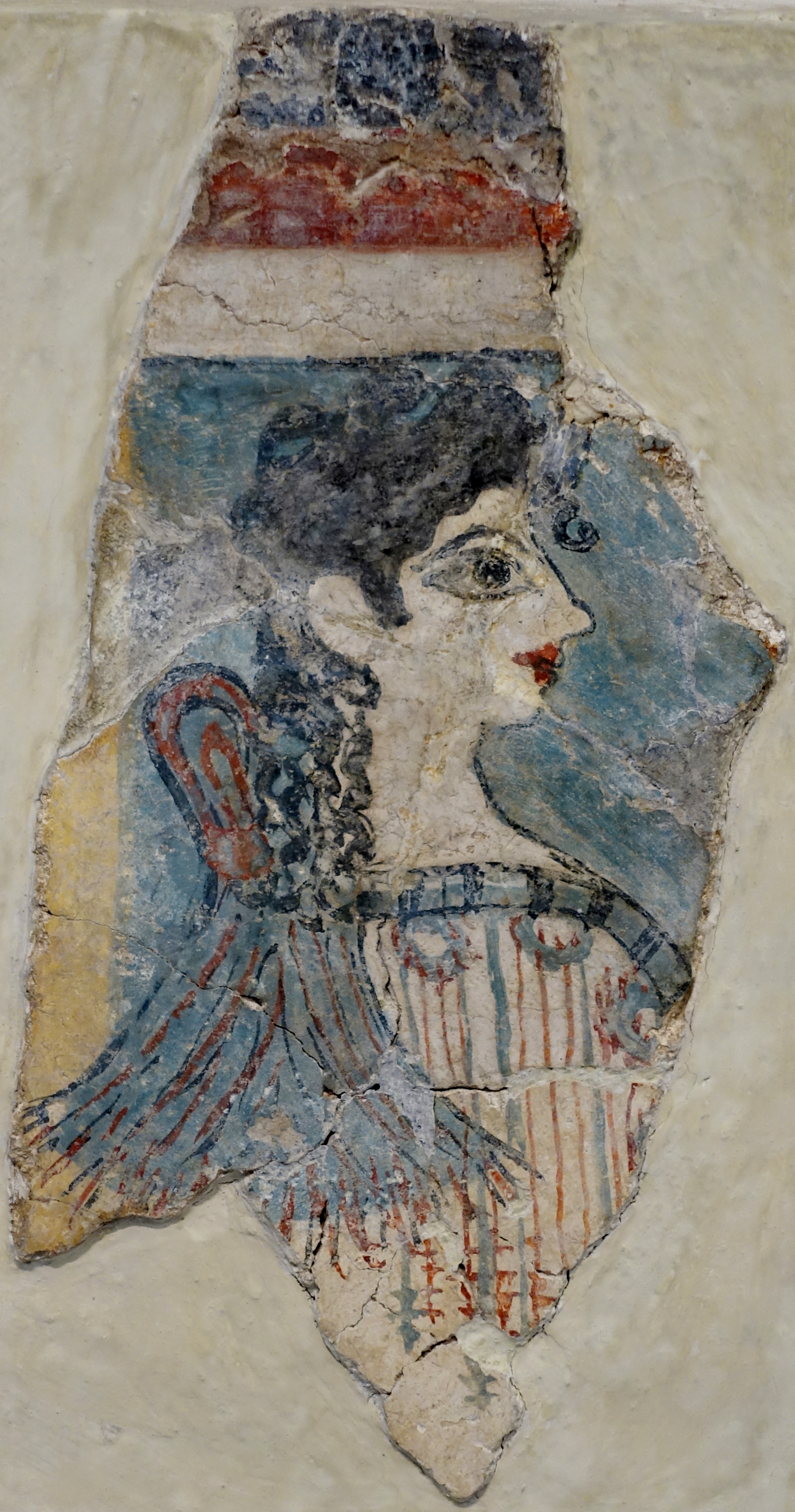 Fresko der sogenannten Pariserin des Palastes von Knossos (1450–1350/1300 v. Chr.), ausgestellt im Archäologischen Museum Iraklio, Kreta, Griechenland